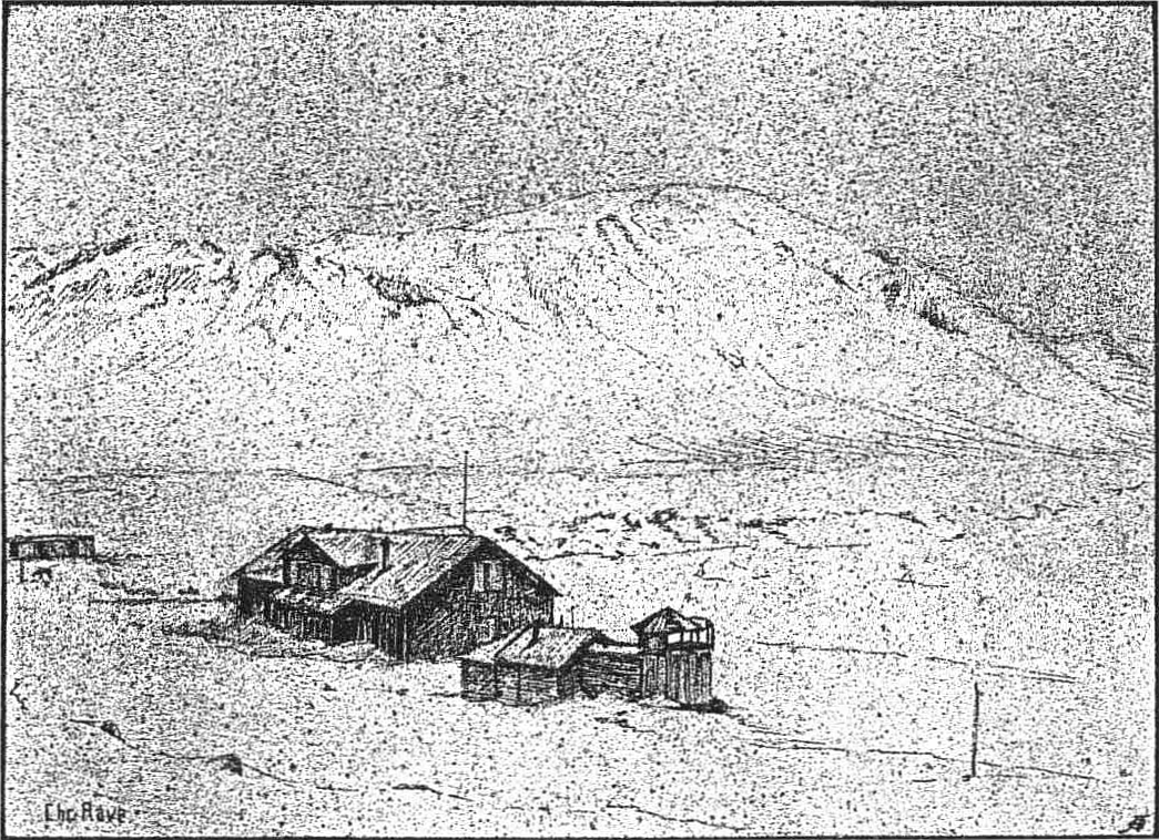 Treurenberg Bay auf Spitzbergen während der Nordpolarmeer-Expedition, die 1912 unter der Führung von Herbert Schröder-Stranz und Kapitän Alfred Ritscher unternommen wurde.